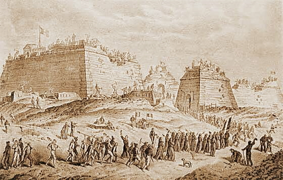 Demolizione della fortezza di Castellamare a Palermo, nel 1861, dopo l'imbarco delle truppe napoletane, ridotto, ritoccato, litografia